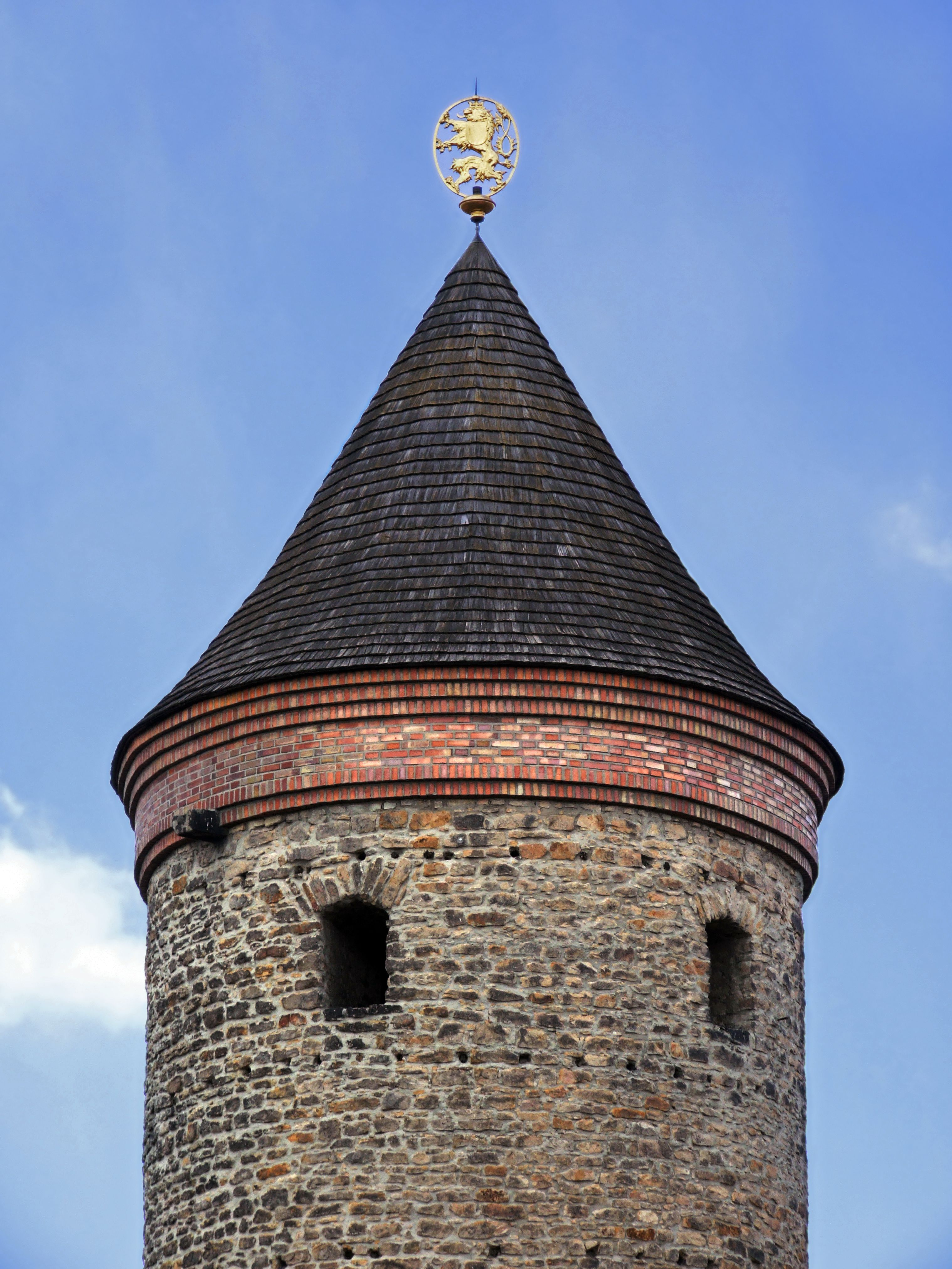 Dvůr Králové nad Labem - Šindelářská věž